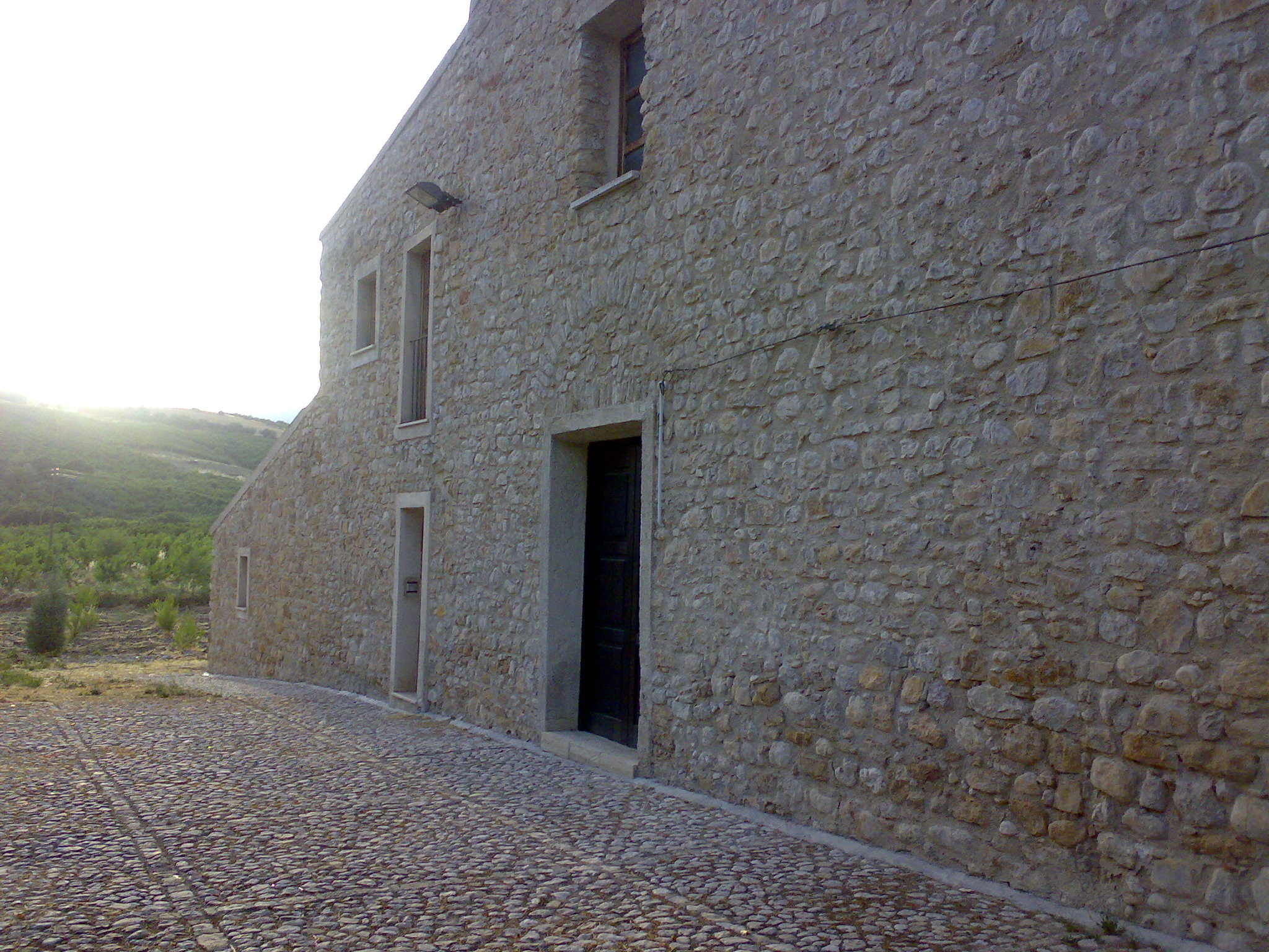 Il Santuario della Madonna dell'Olio